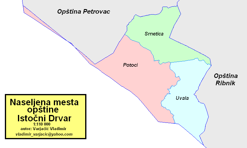 Opština Istočni Drvar